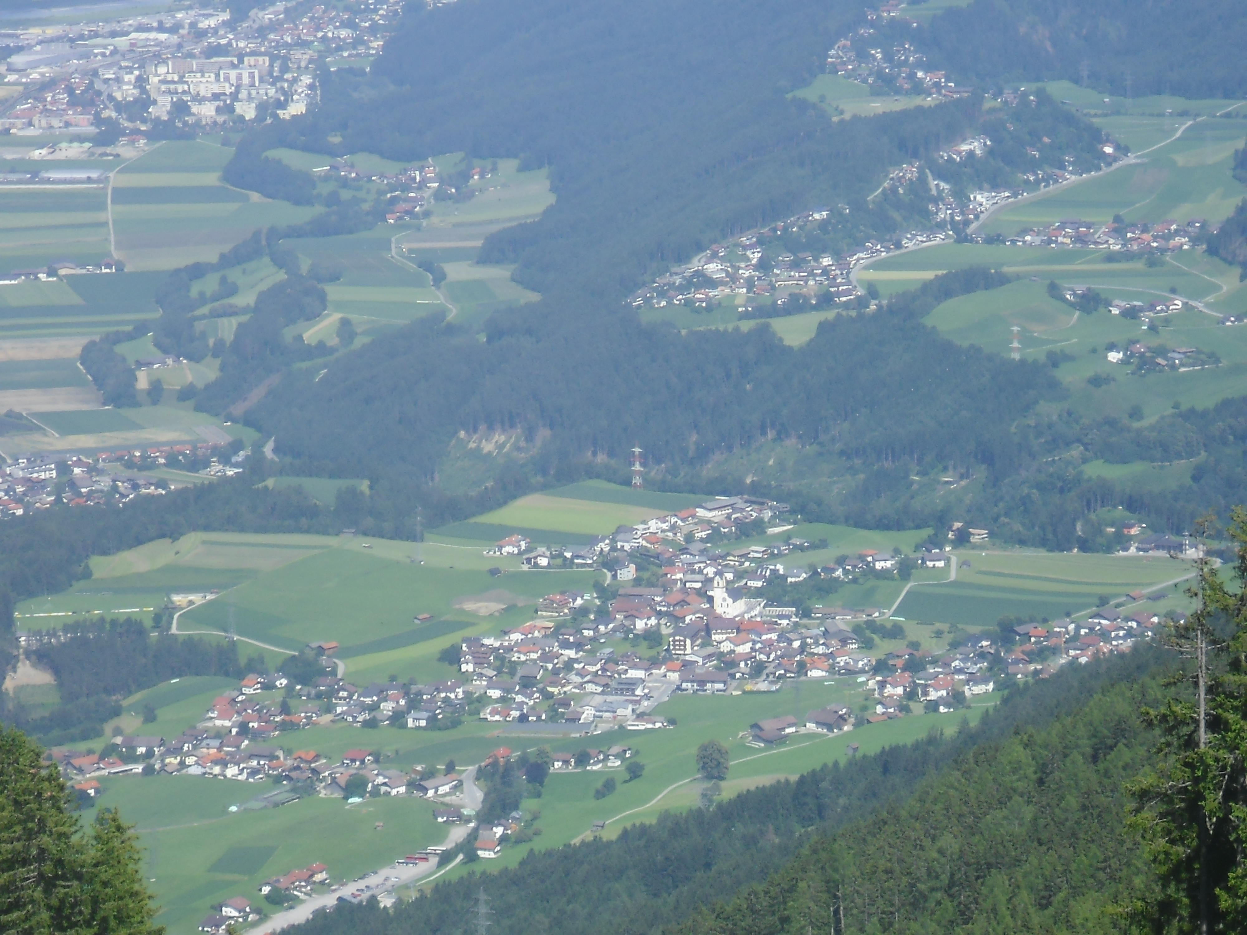 Gemeinde Oberperfuss in Tirol im Vordergrund